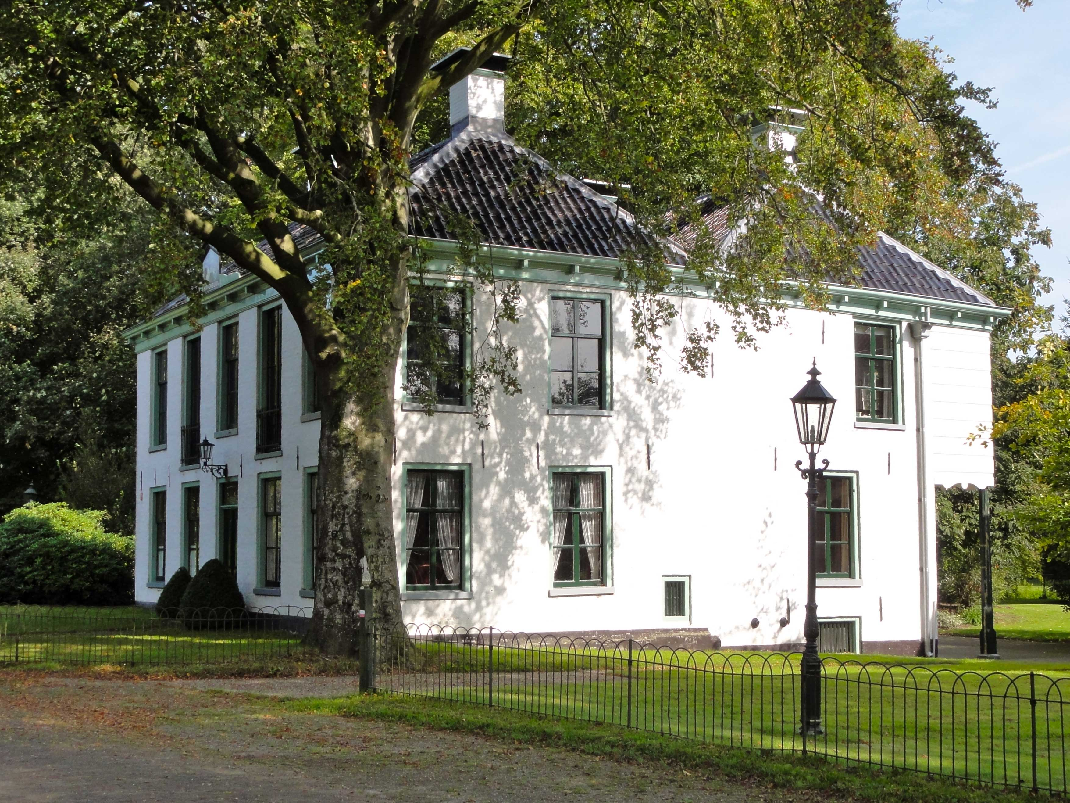 De Kippenburg ten noorden van Oudemirdum